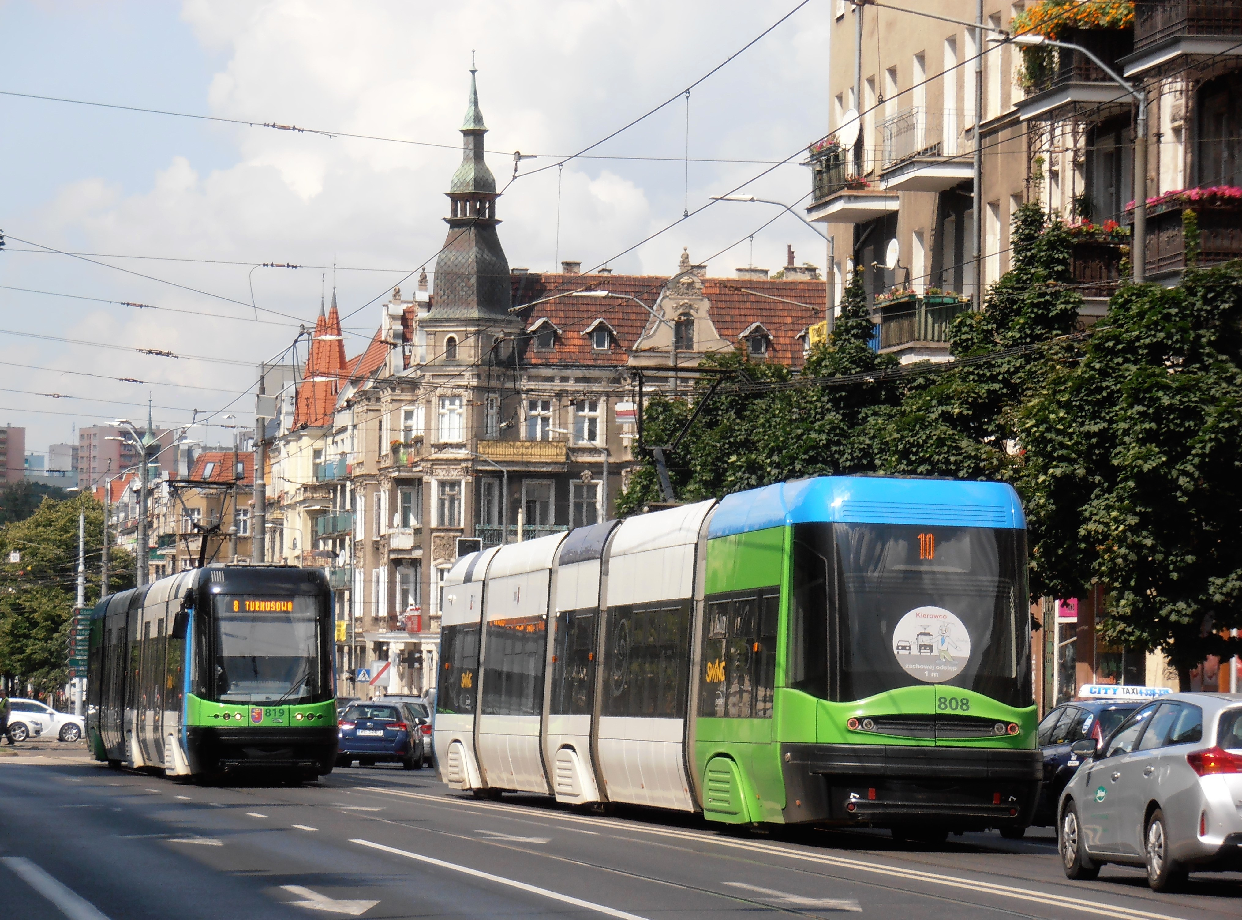 Tramwaje typu Pesa Swing w pobliżu przystanku pl. Kościuszki w Szczecinie.